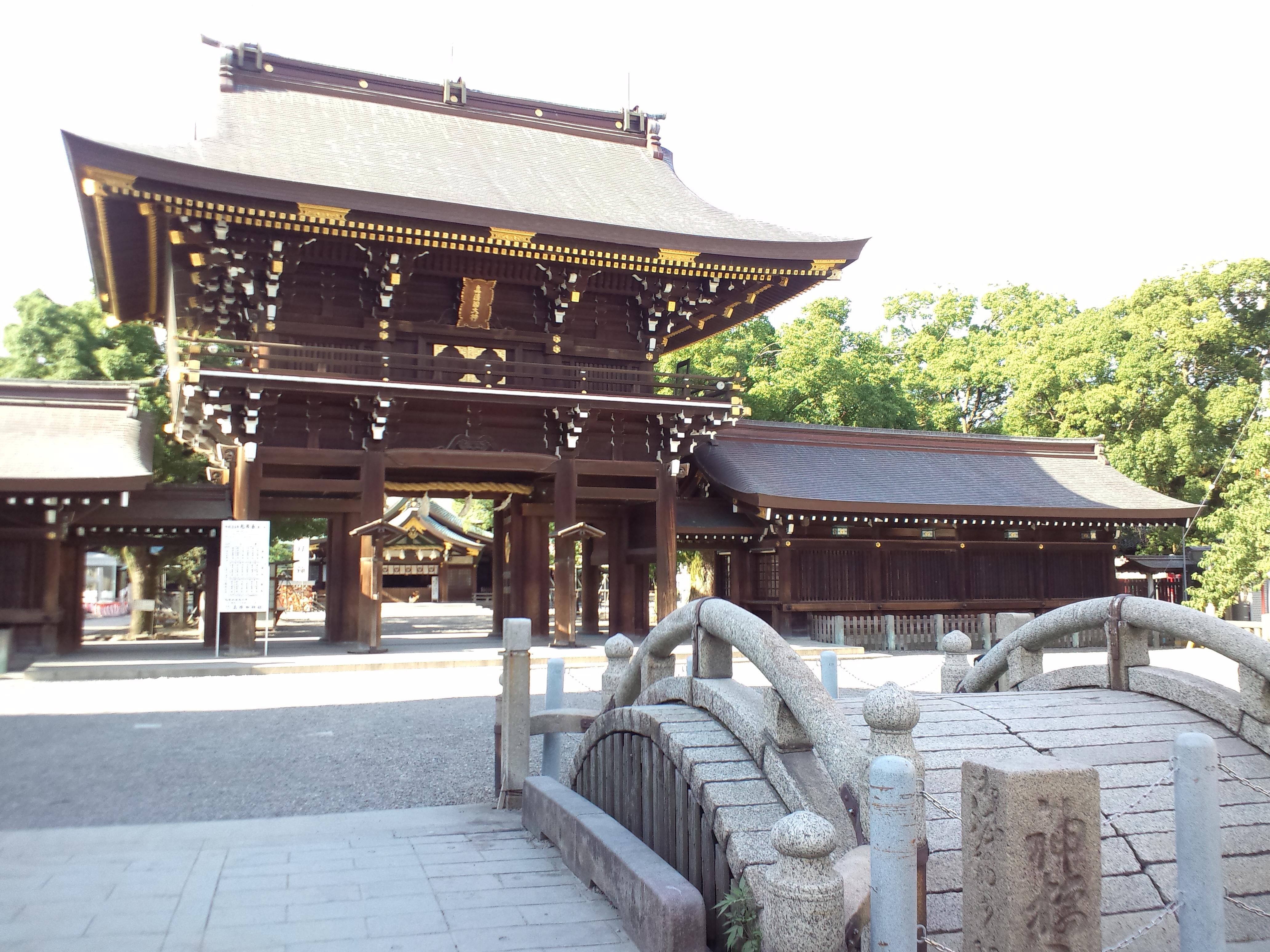 真清田神社 楼門